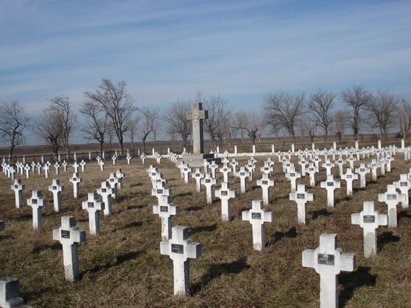 Memorialul Șarjei de la Prunaru